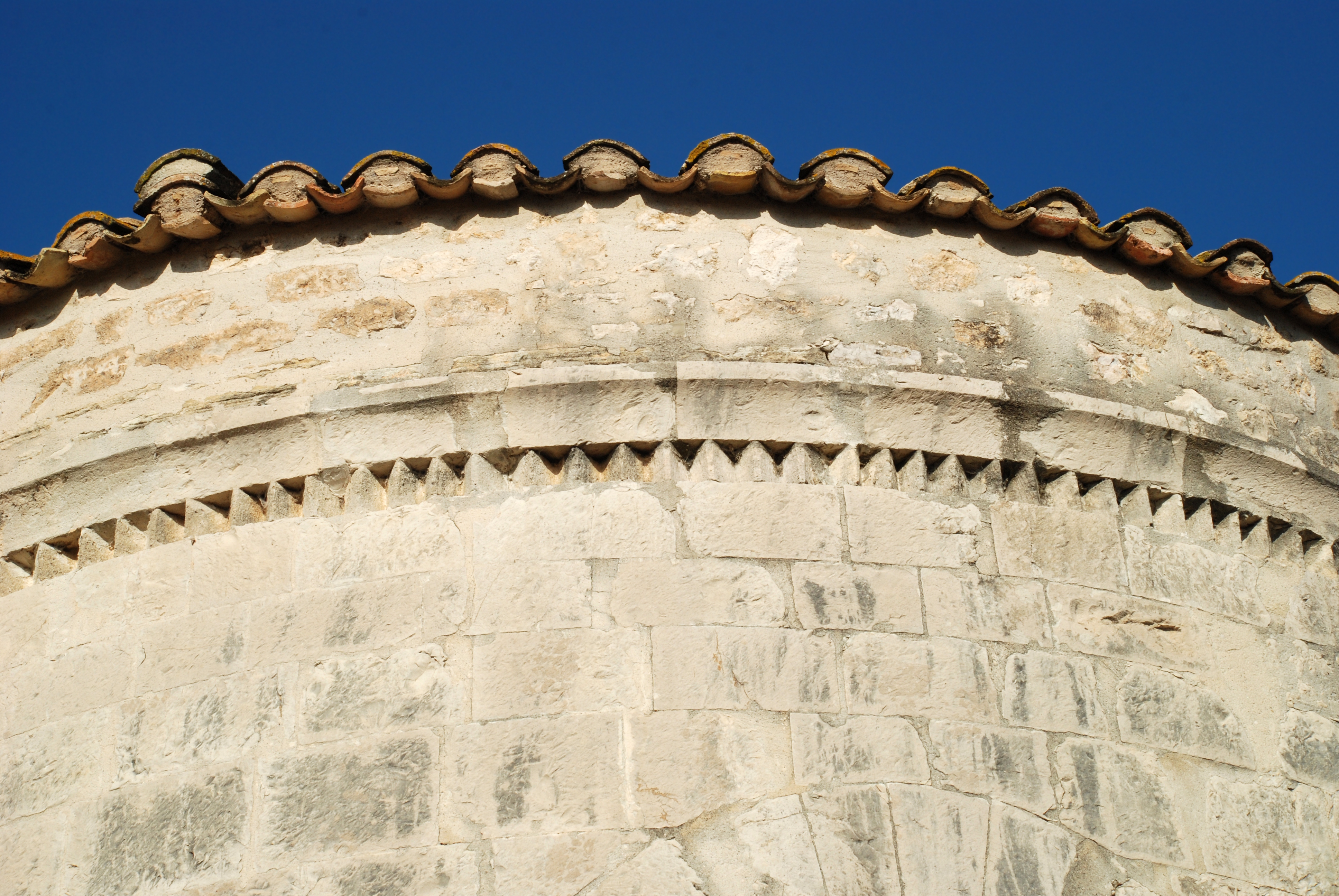 France - Hérault - Église Saint-Martin de Campagne